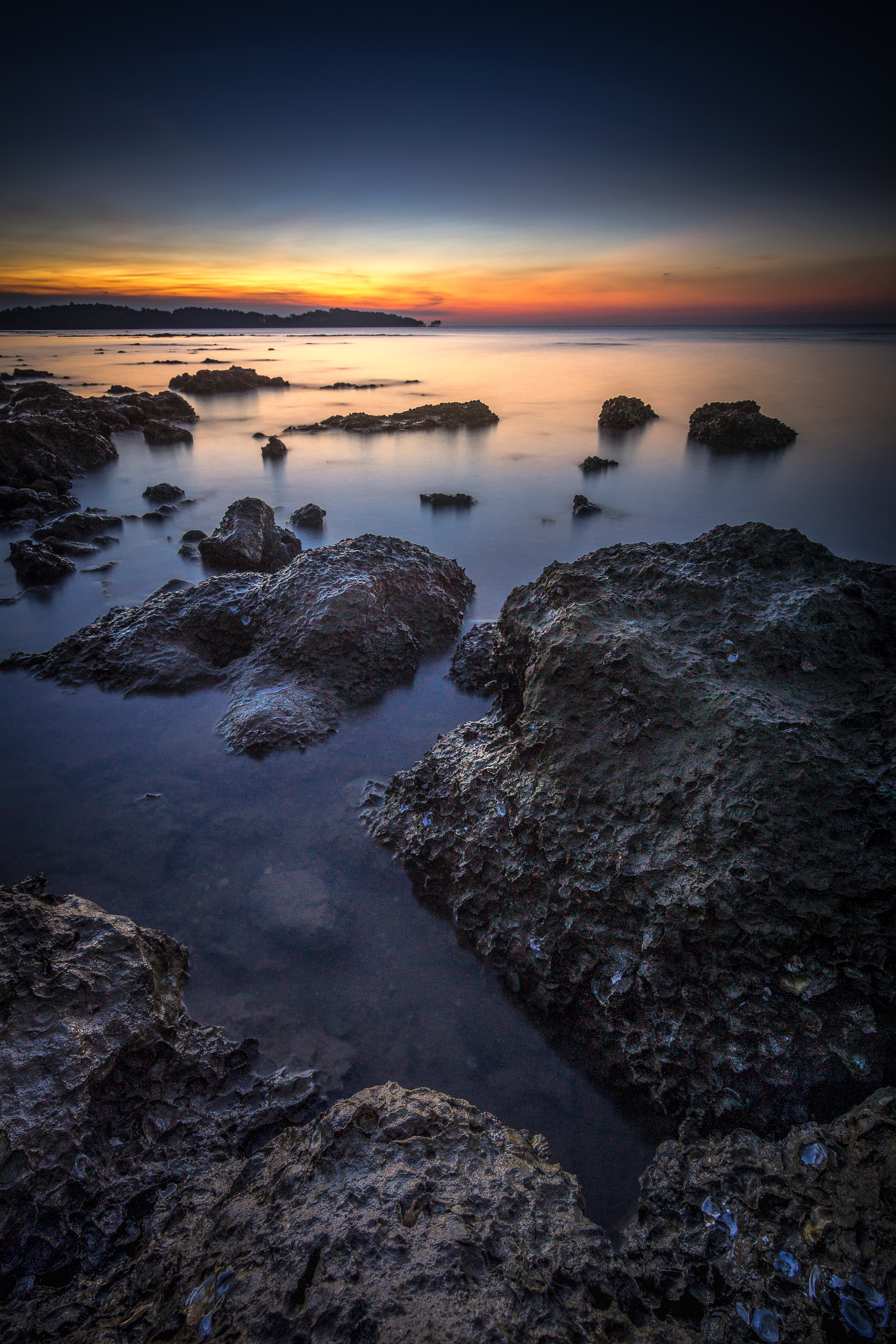 blue hour di tanjung bumi madura jawa timur